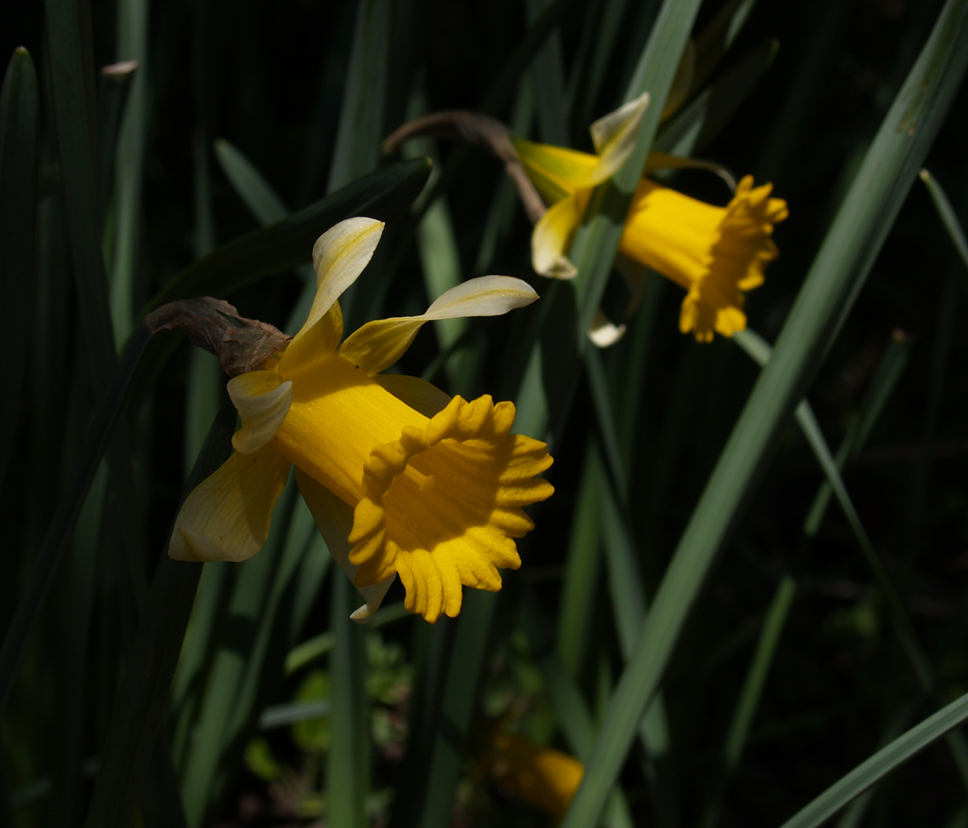 Narcissus pseudonarcissus